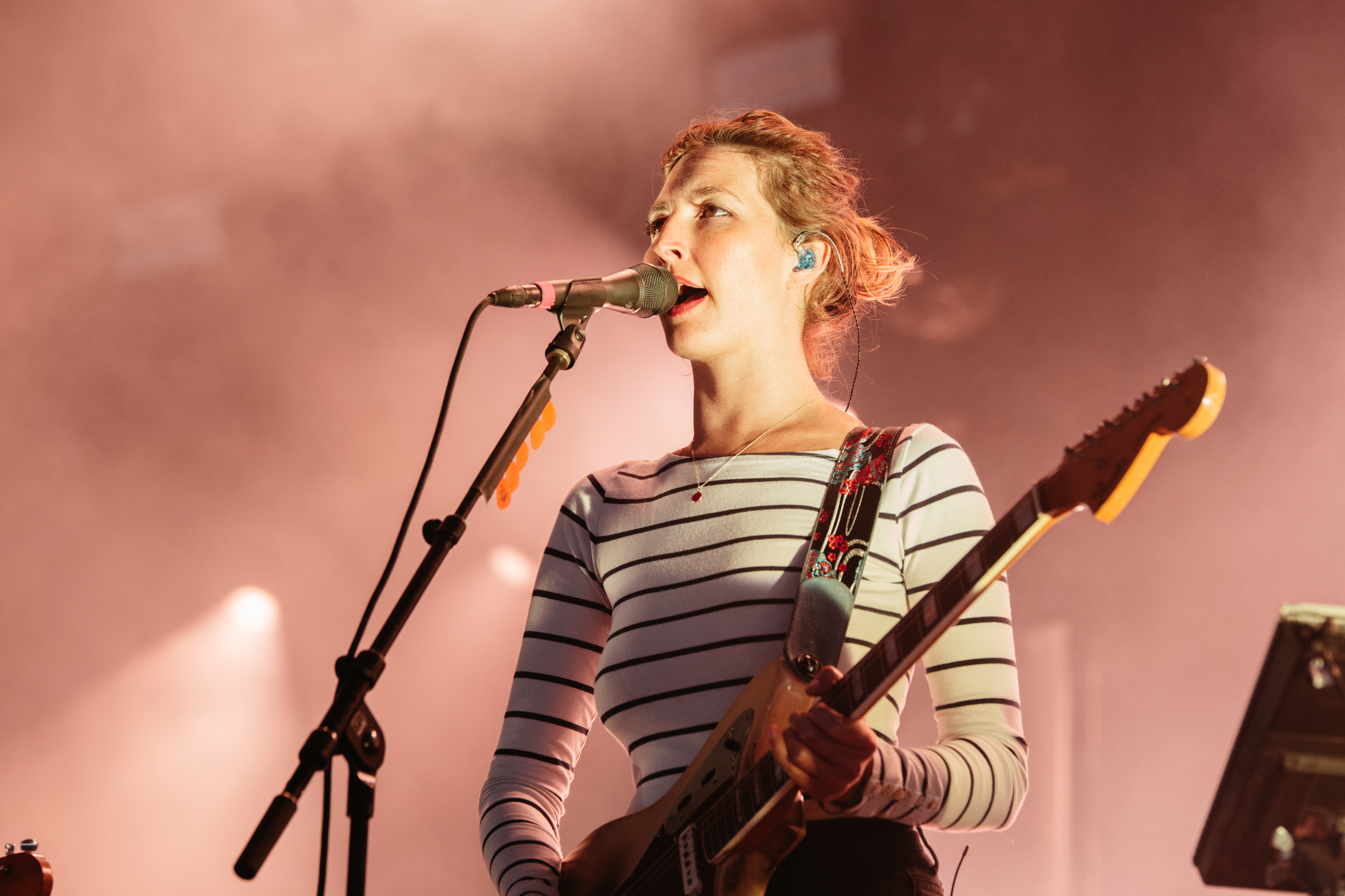 Photo: Krists Luhaers // @Kristsll